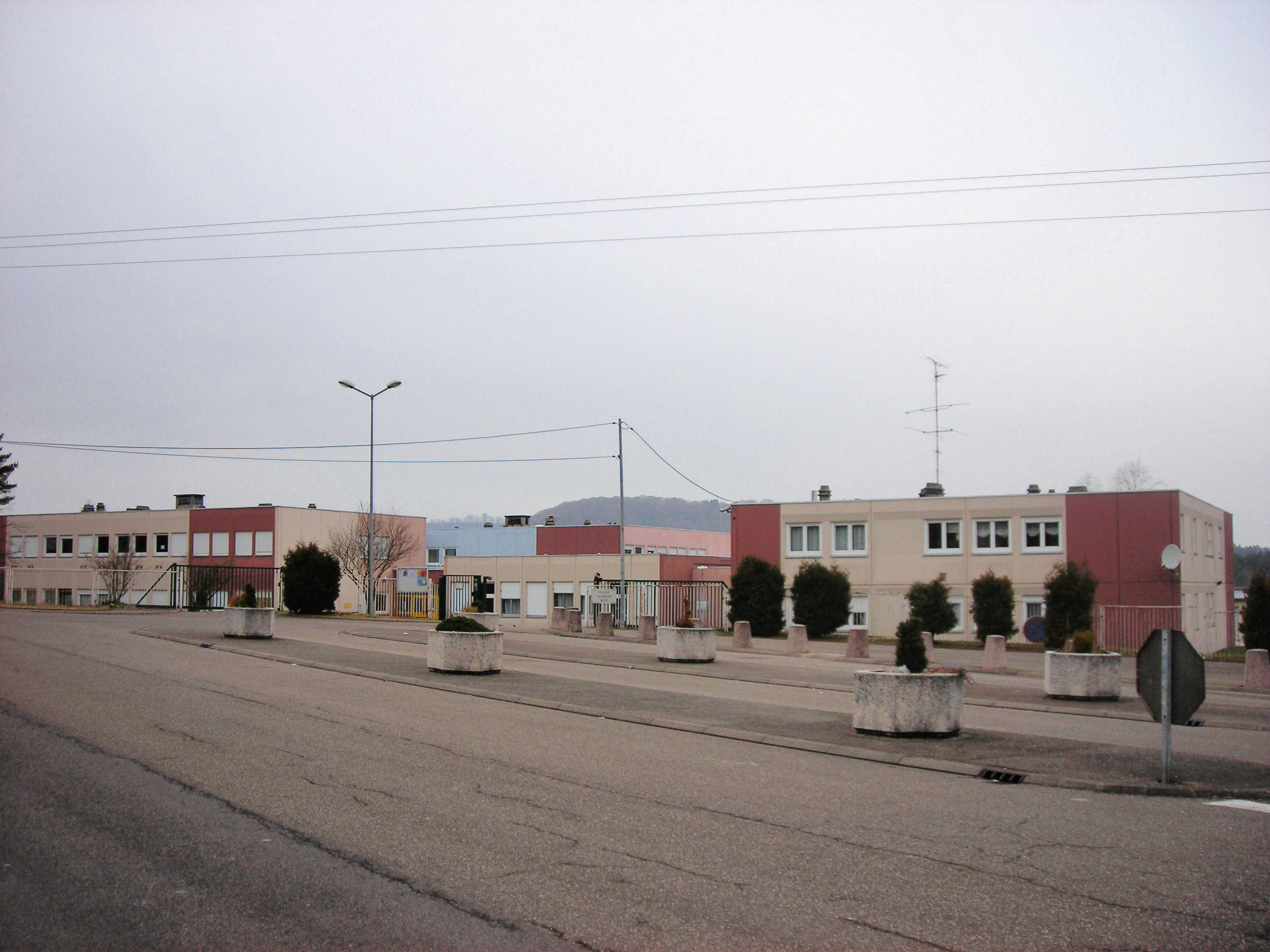 Collège de Ham-sous-Varsberg (57 France)